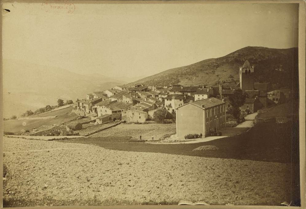 Vue générale d'Oms vers 1885